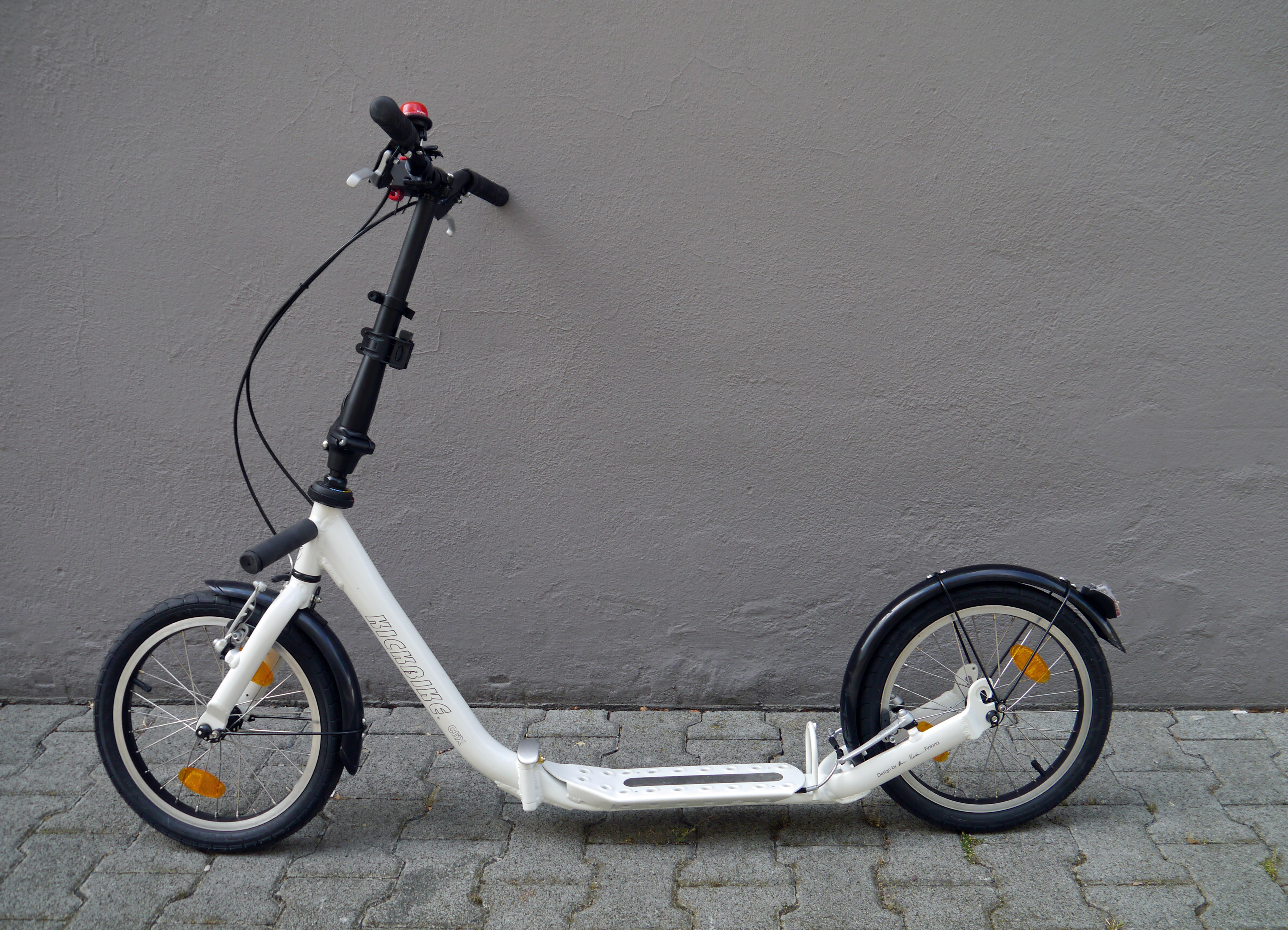 Faltbarer Tretroller mit 16-Zoll Bereifung und Felgenbremsen, Modell "Kickbike Clix 2-0", der Firma Kickbike Austria.